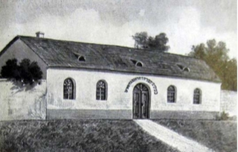 Jewish prayer house in der Marienstrasse - Linz - 1877